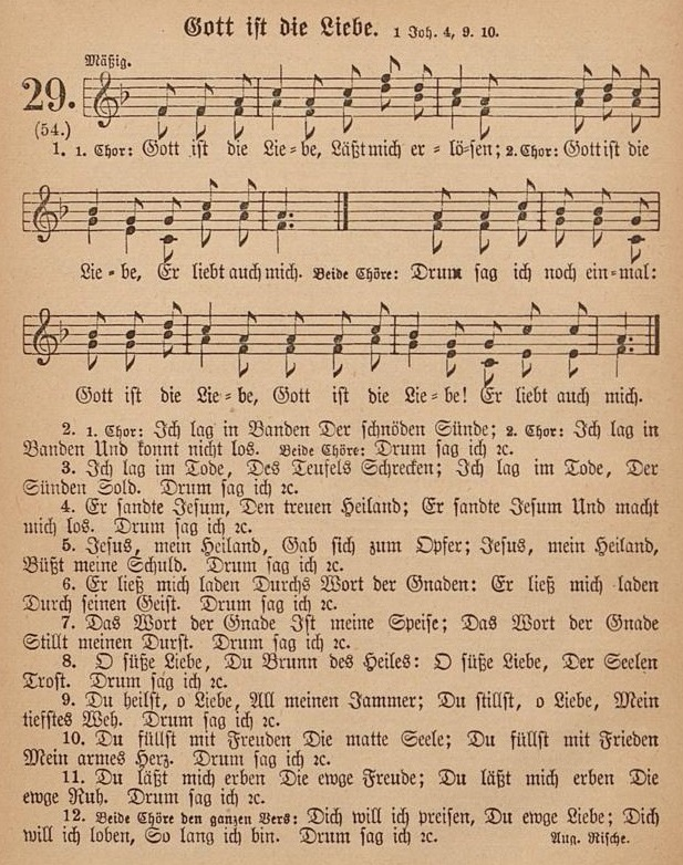 August Rische: Gott ist die Liebe. Die Melodie war im 19. Jahrhundert mit verschiedenen, auch weltlichen Texten verbreitet; heute ist sie vor allem als Am Weihnachtsbaum die Lichter brennen bekannt.